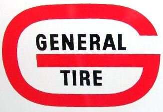 logo gt